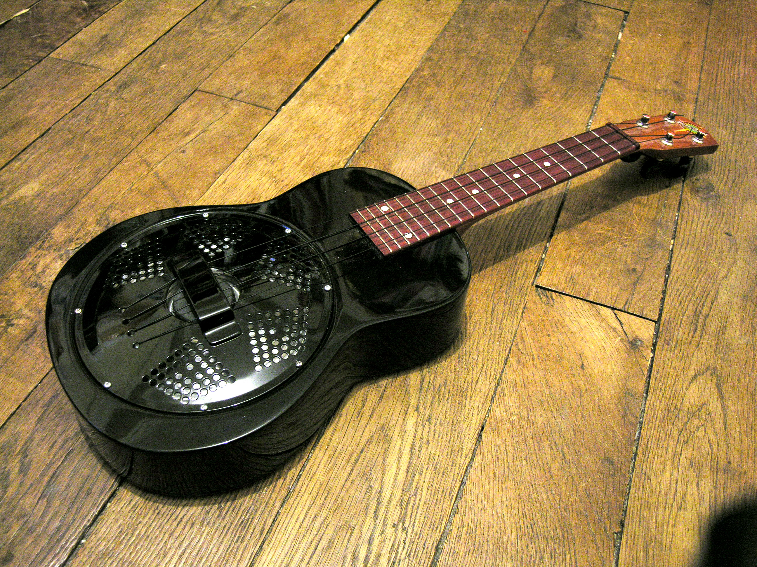 Ukulélé à résonateur noir de marque Beltona